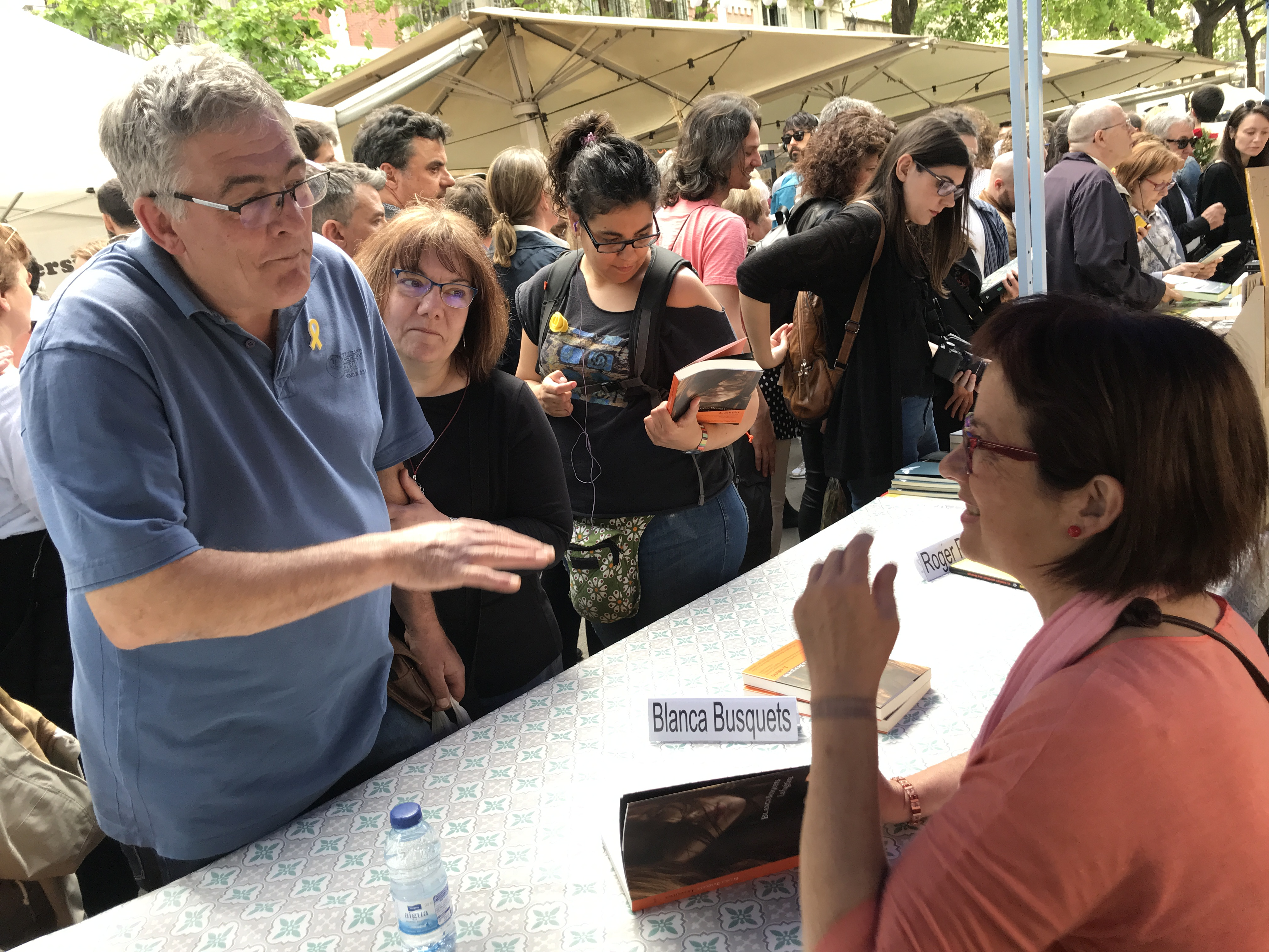 Blanca Busquets signant llibres per Sant Jordi 2018